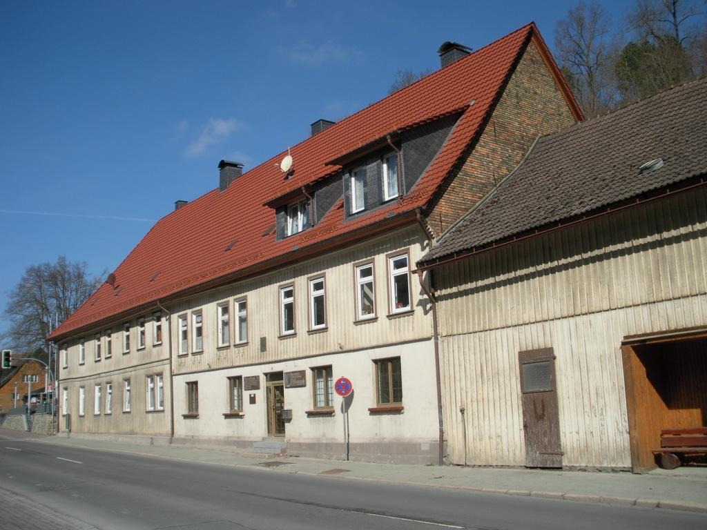 Rübeland, ehemalige Gemeindeverwaltung und Verwaltung der Höhlen